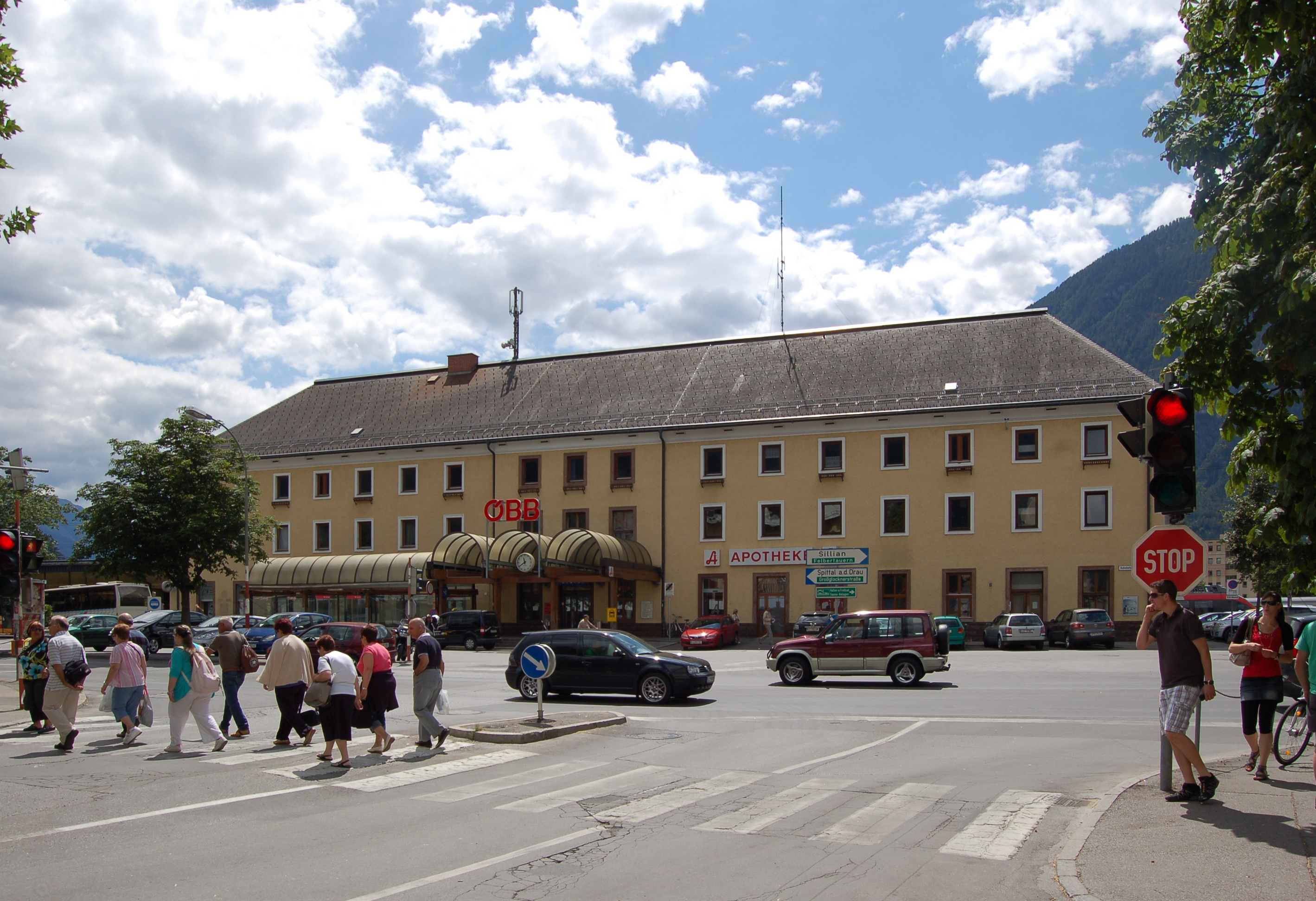 Der Bahnhof in Lienz.